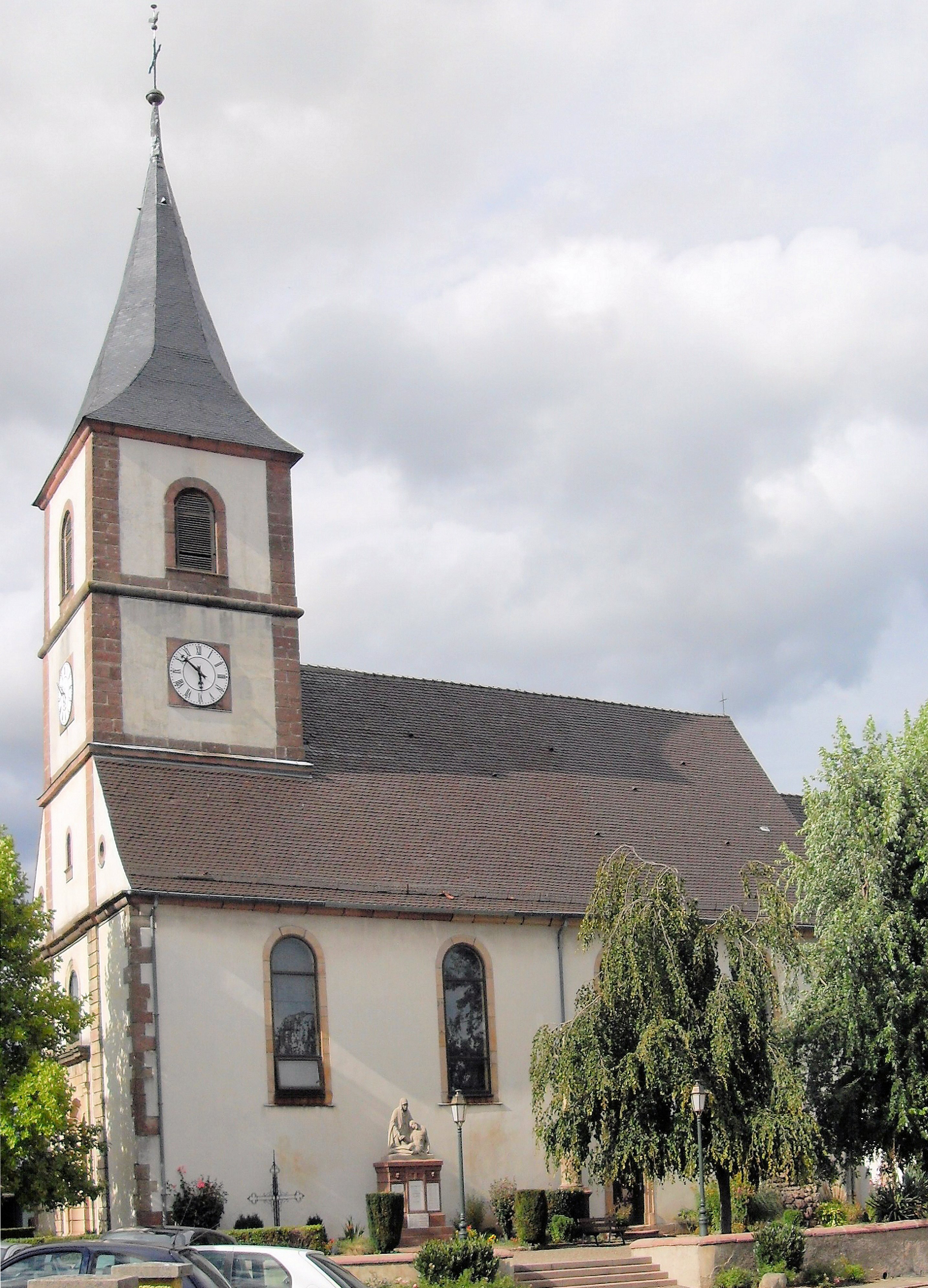 Eglise Sainte-Brigitte d’Irlande à Berrwiller